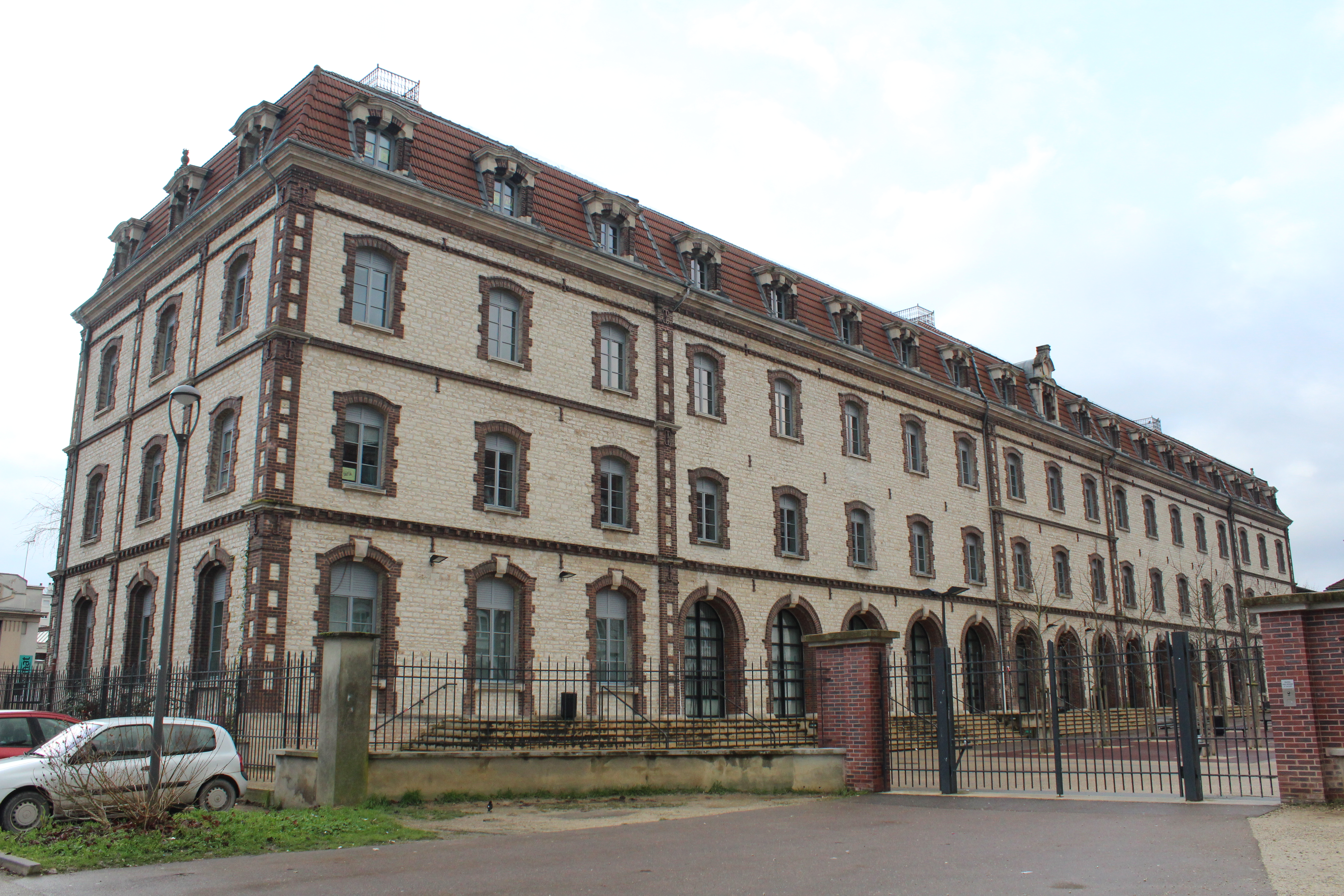 Collège Beurnonville, Troyes.